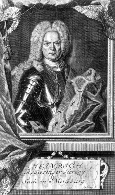 Heinrich, Herzog von Sachsen-Merseburg (1661-1738)